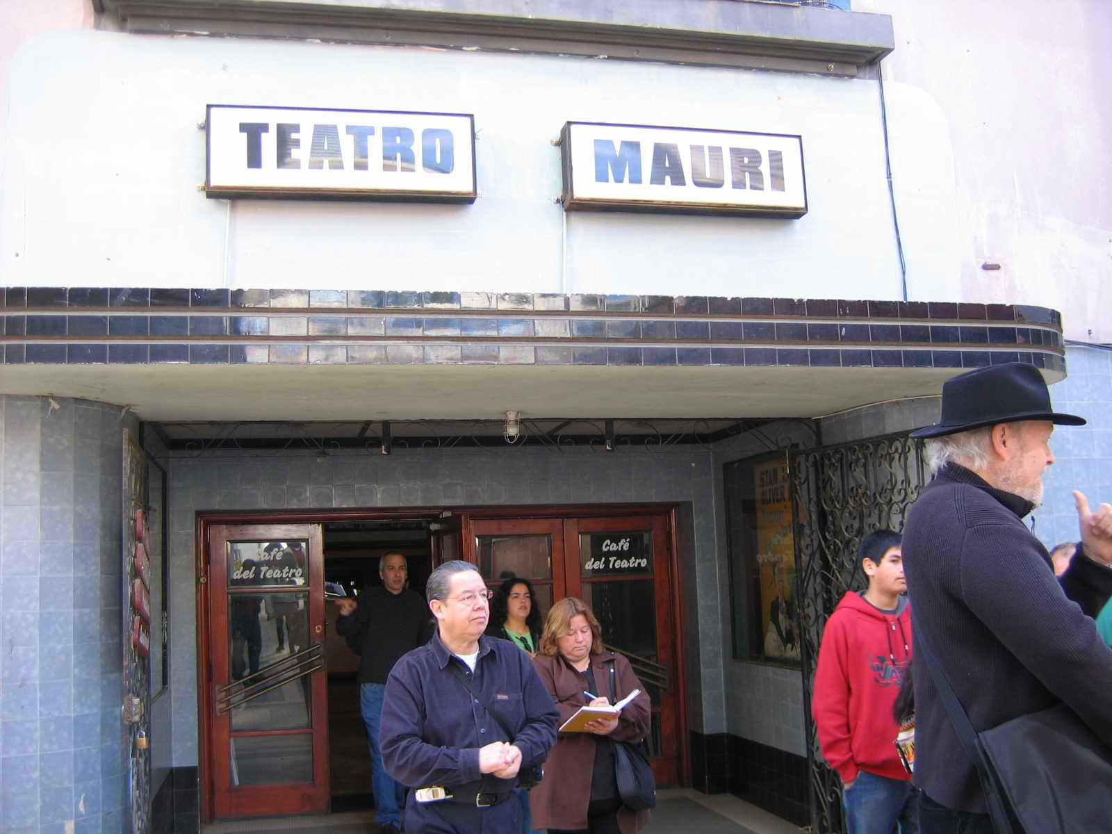 Salida Teatro Mauri